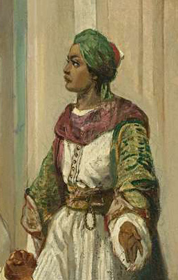 Prince Dipo negoro, figure, detail from Pieneman